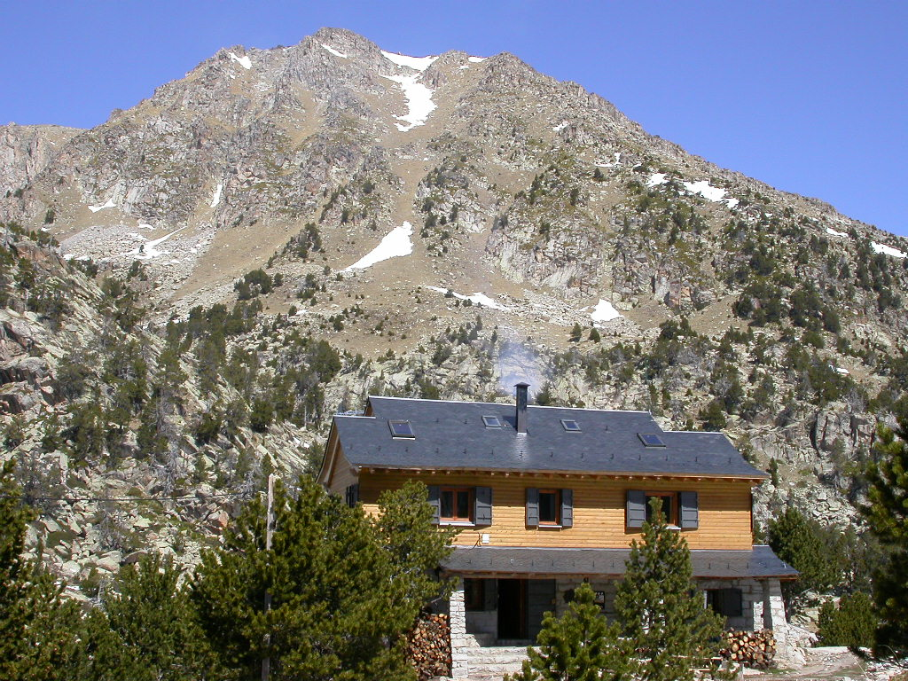 Refugi Josep Maria Blanc